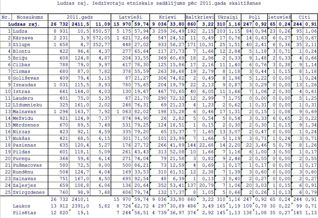 Latvijas 2011 gada tautas skaitīšanas dati